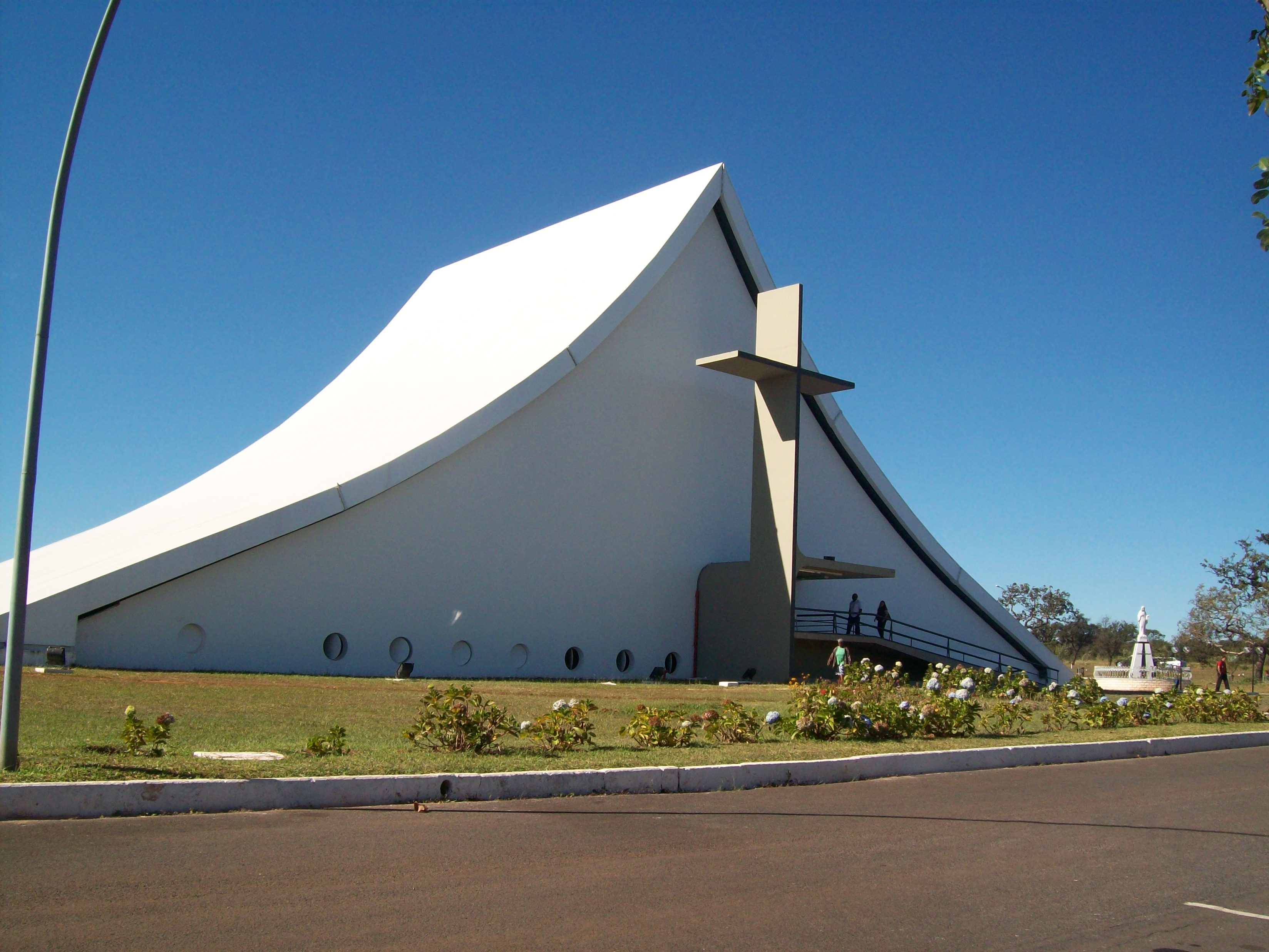 Brasilia DF Brasil - Igreja Rainha da Paz